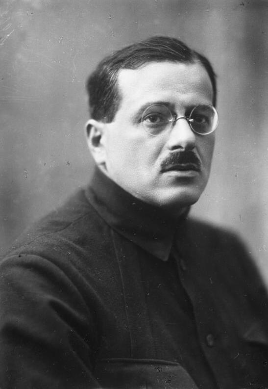 Der bekannte Sowjet-Kriegskommissar Unschlicht gestürzt ! Der bekannte Sowjet-Kriegskommissar Unschlicht wurde plötzlich seines Amtes enthoben